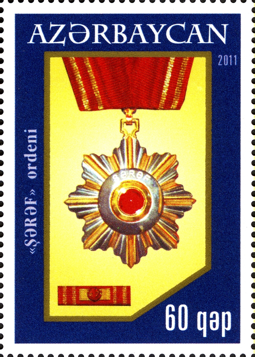 Azərbaycan Respublikasının Ordenləri.